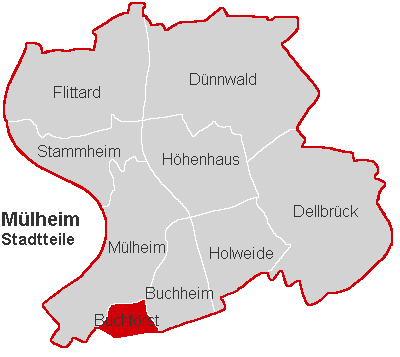 Lagekarte Buchforst im Stadtbezirk Köln-Mülheim